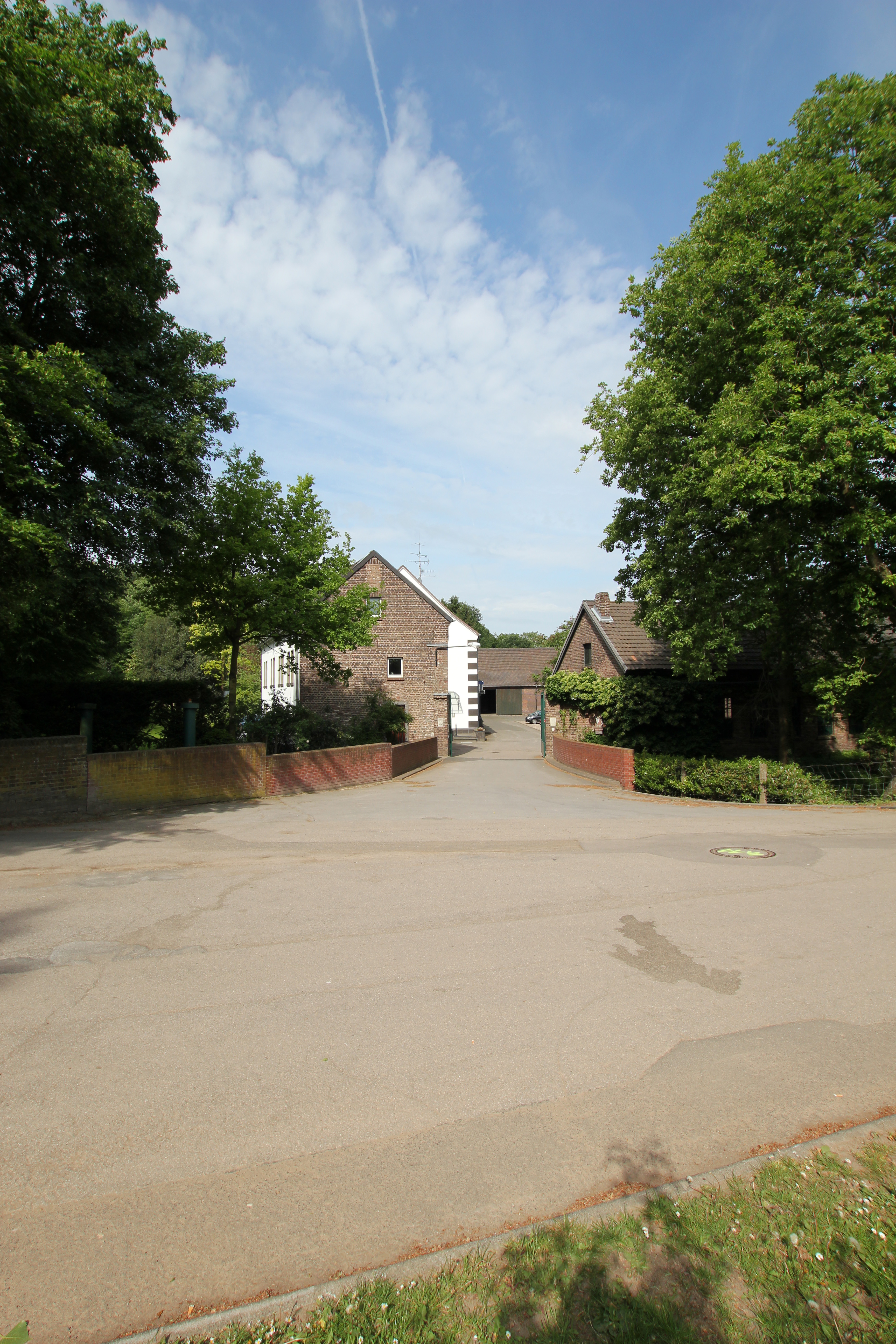 Köln Stüttgenweg, Stüttgenhof